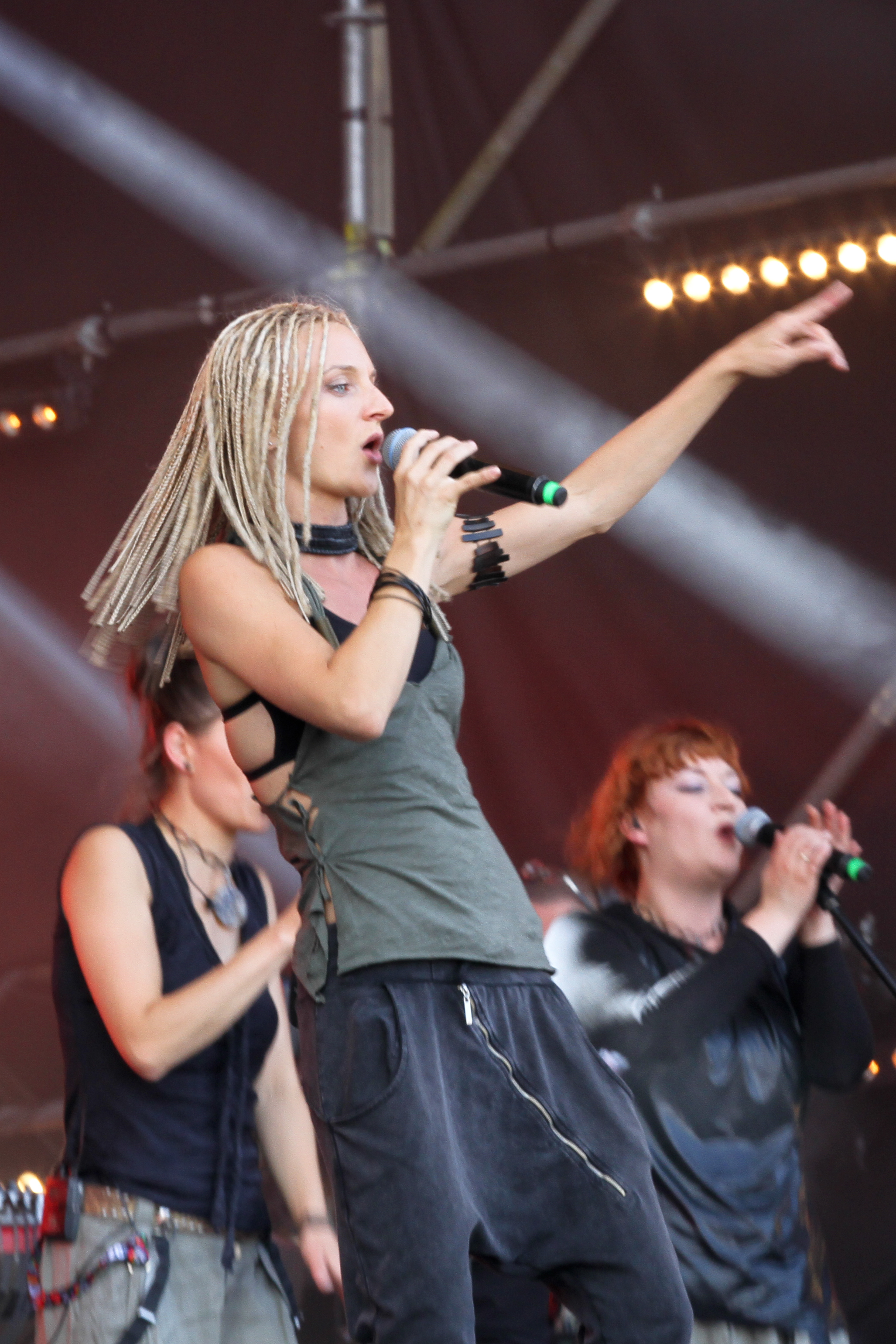 Shata QS na dużej scenie na XX Przystanku Woodstock 2014.